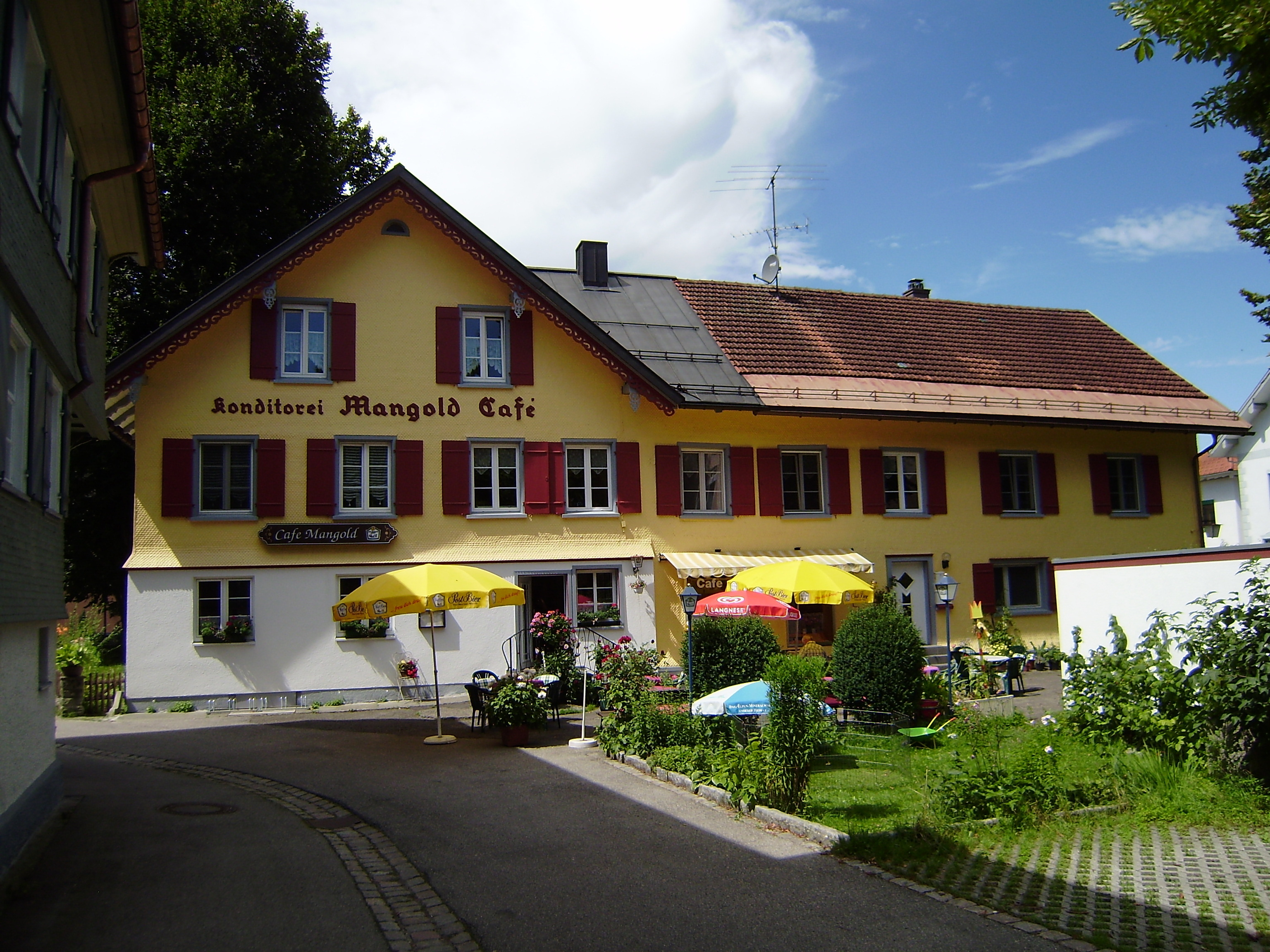 Haus Mangold, ehem Kellhof d Klosters St Gallen in Weiler im Allgäu